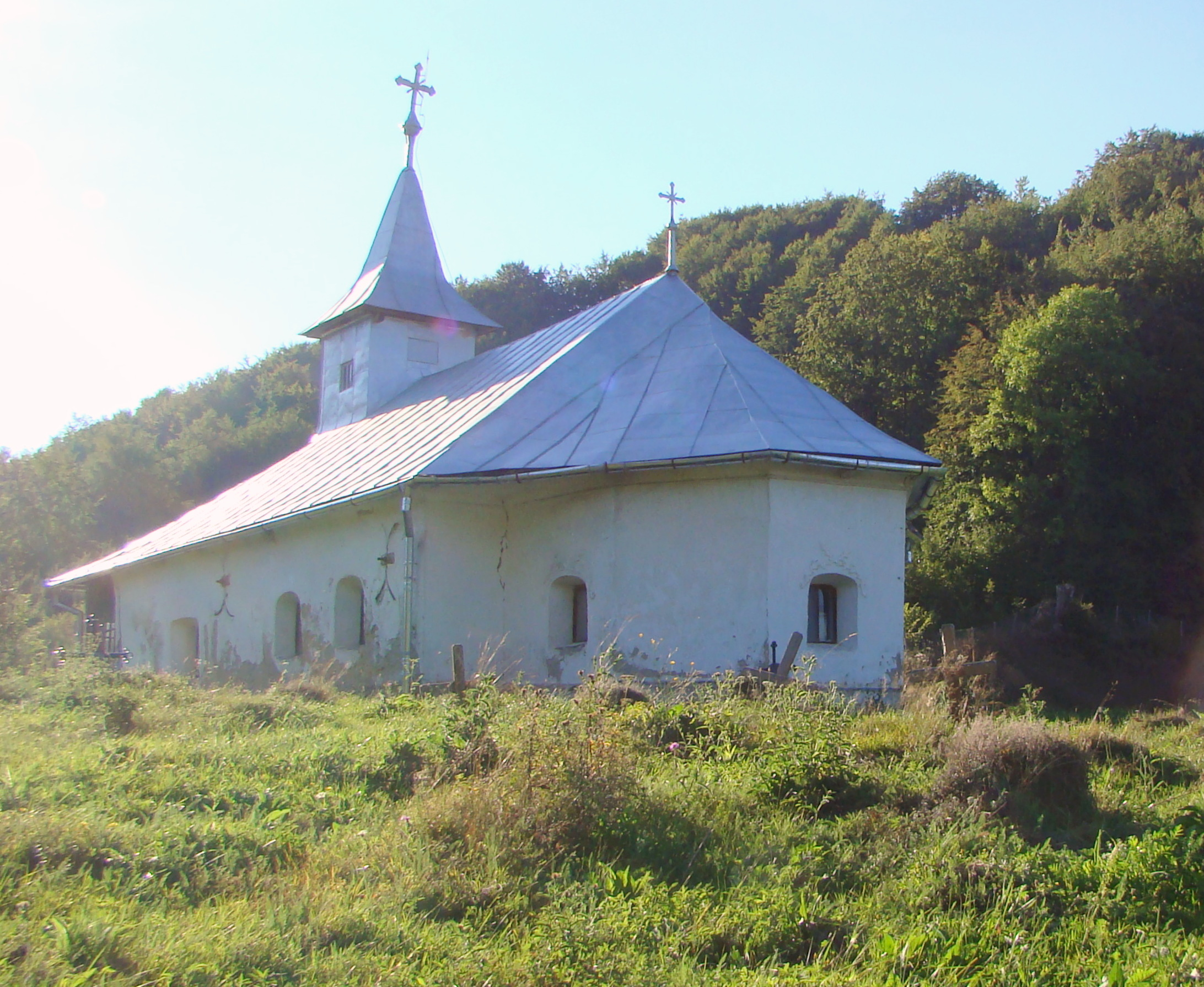 Biserica „Sf. Dumitru”, sat Poieni; comuna Vidra